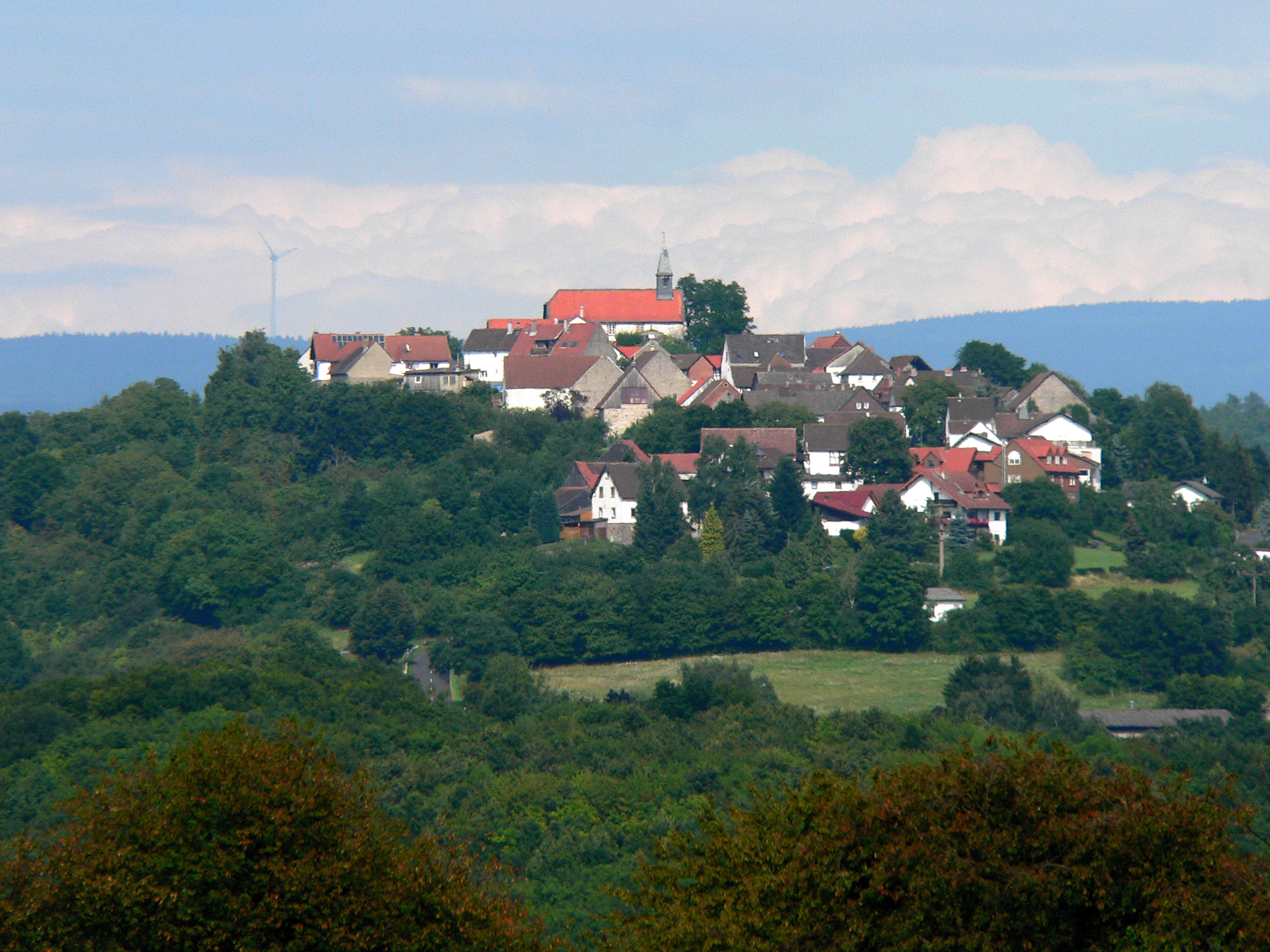 Stornfels, Stadtteil der Stadt Nidda in Hessen, Deutschland